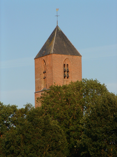 Kerktoren Havelte